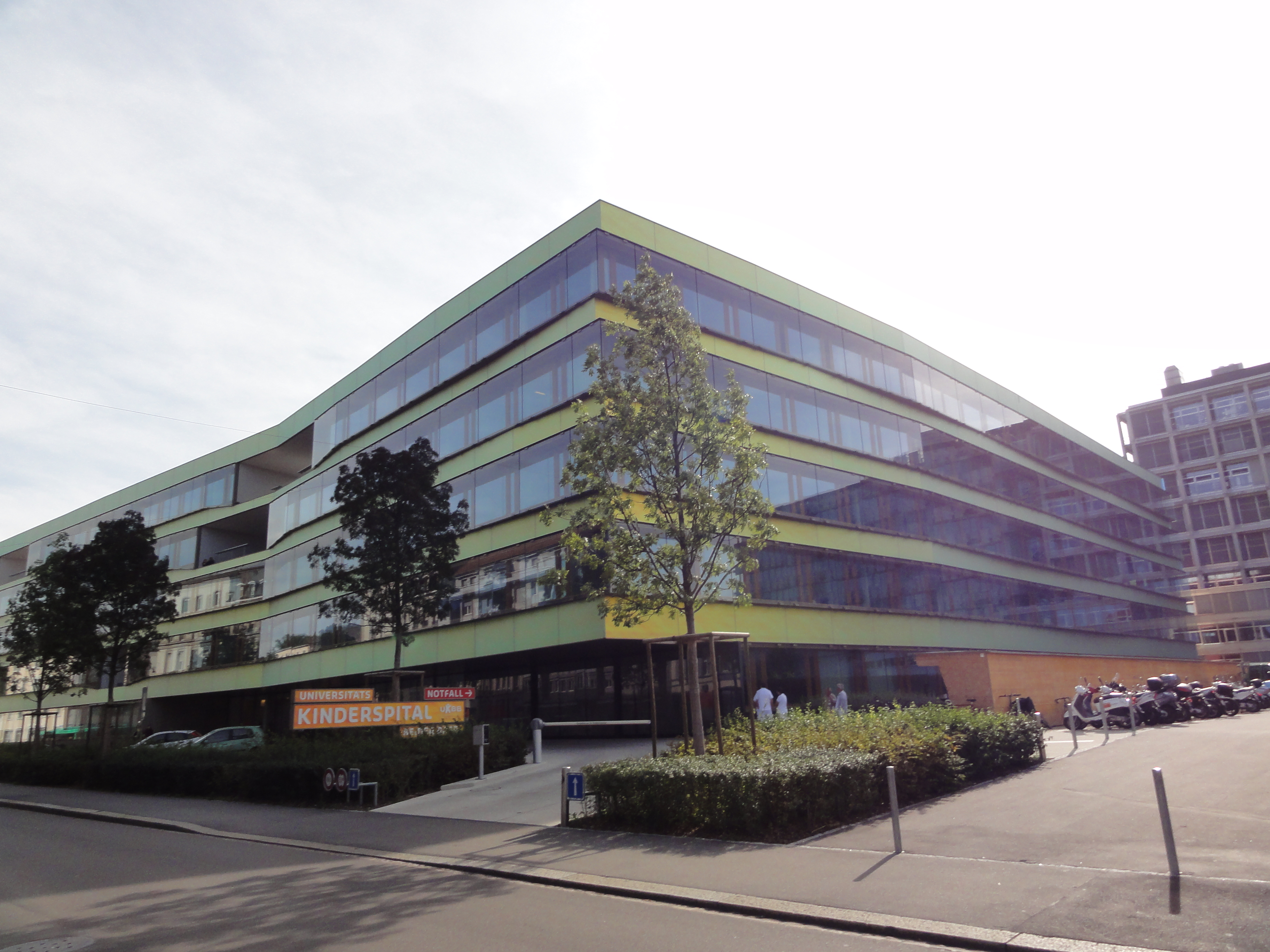 Basel – Kinderspital der Universität – Aussenansicht